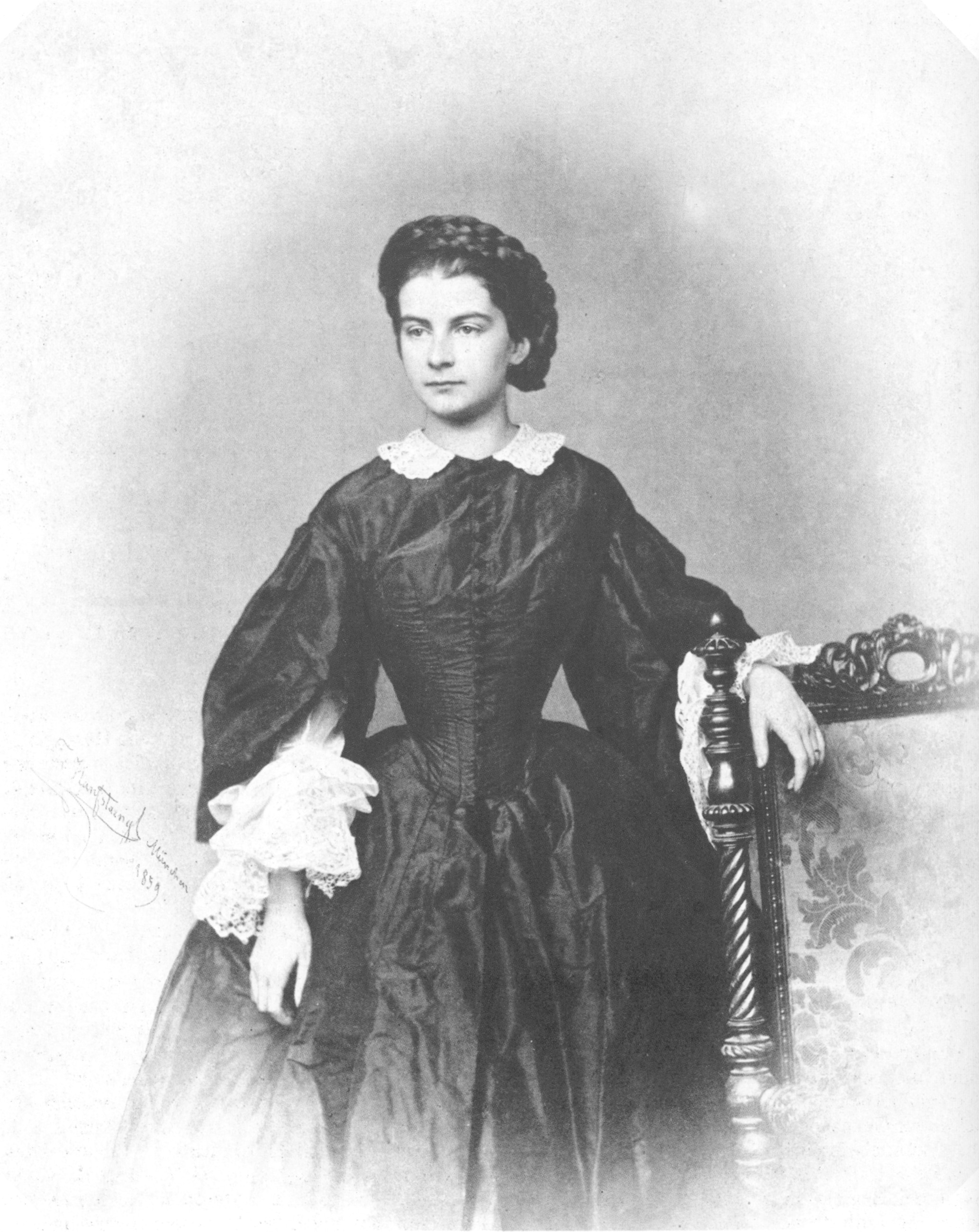 Herzogin Marie in Bayern, Königin von Neapel (1841-1925)